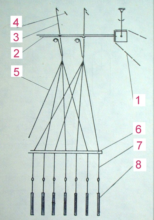 Schema: Jacquardmaschine Česky: Schematicky nakres zakaroveho stroje